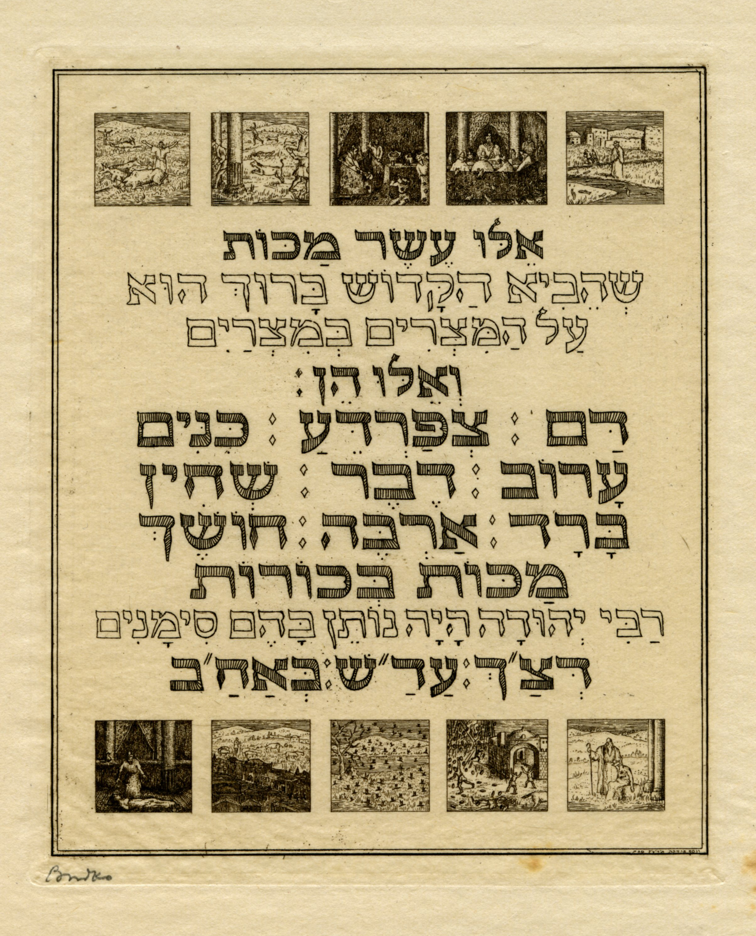 Print